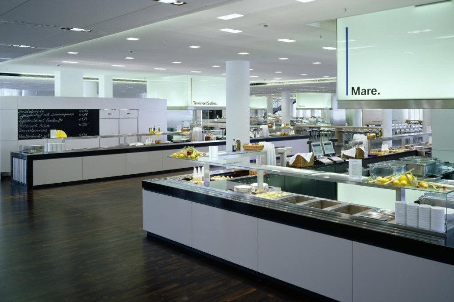 Betriebsrestaurant BMW, Geschäftsfeld Innenausbau